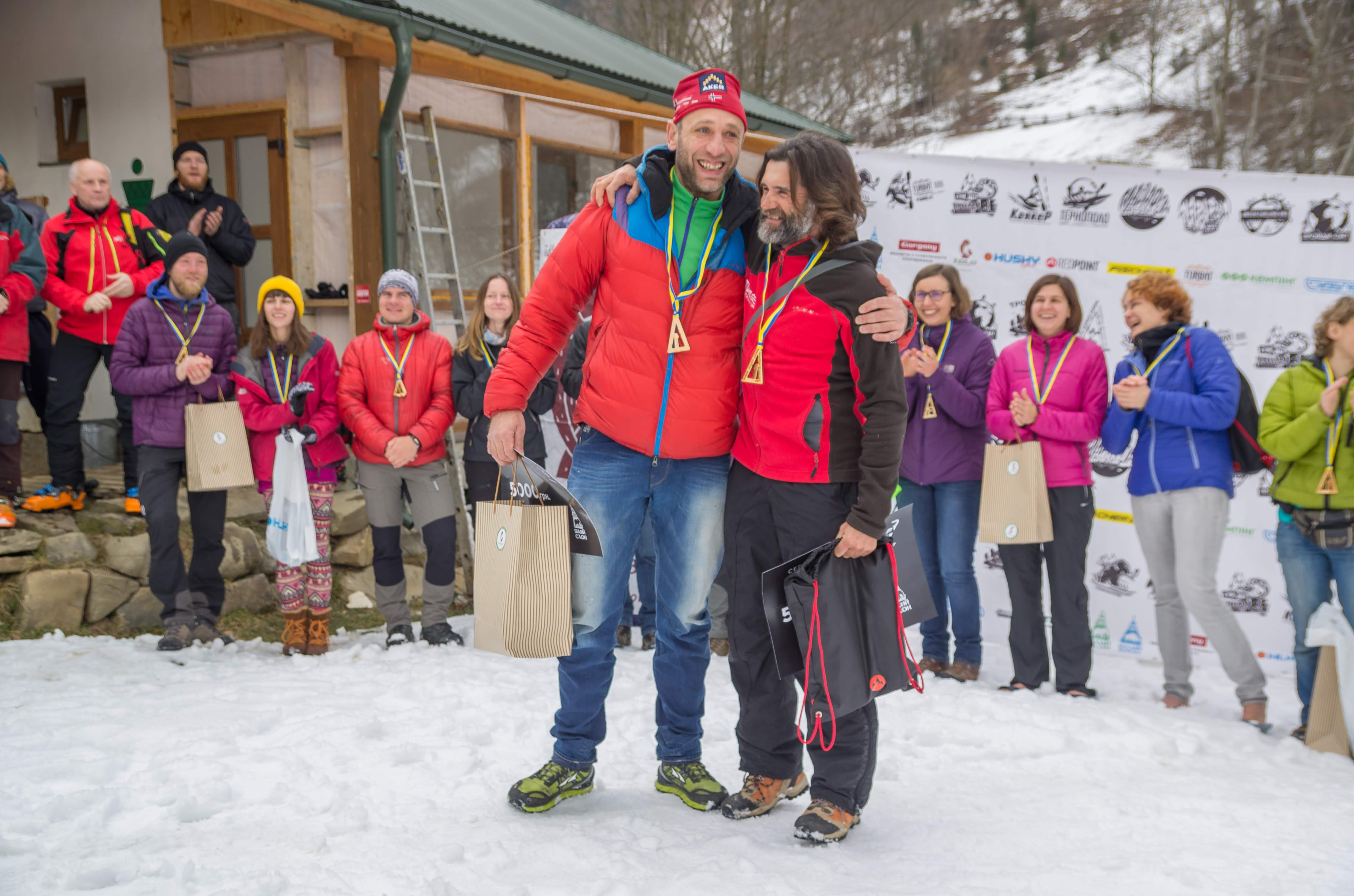 Нагродження. Кубок Білого Слона 2018 Кемп "Білий Слон", с. Нижня Дземброня